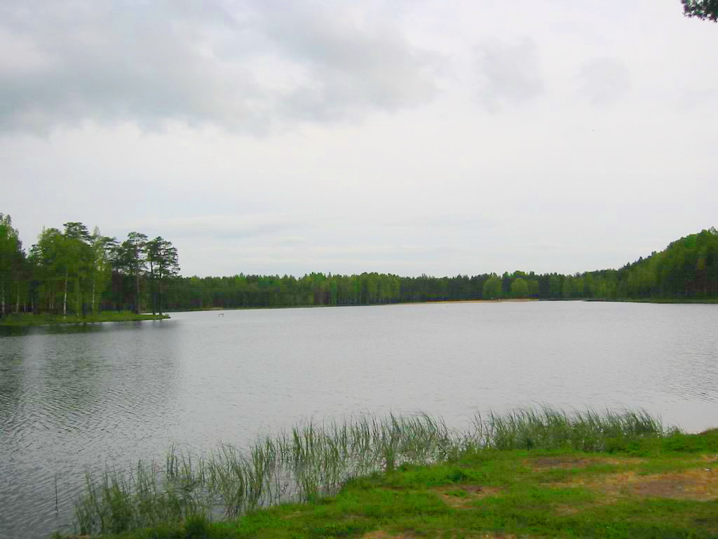 Коркинское озеро.